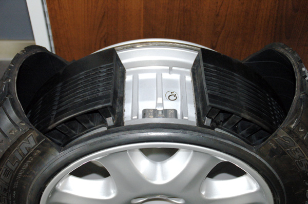 Sicherheitsreifen, safety tire, runflat system